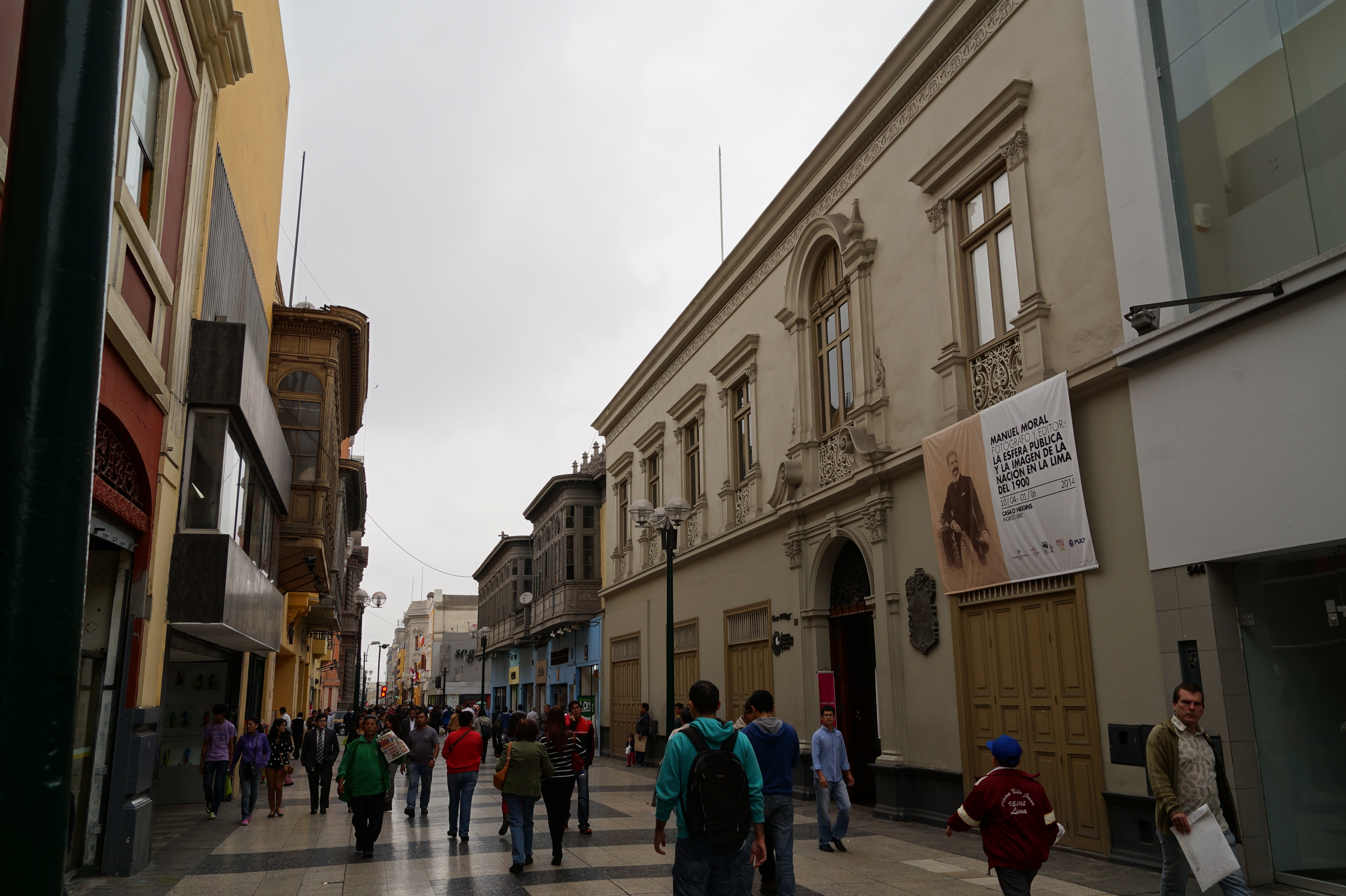 Manuel Moral, Fotógrafo, Exposición, Lima del 1900, Casa O'Higgins, Lima, Perú